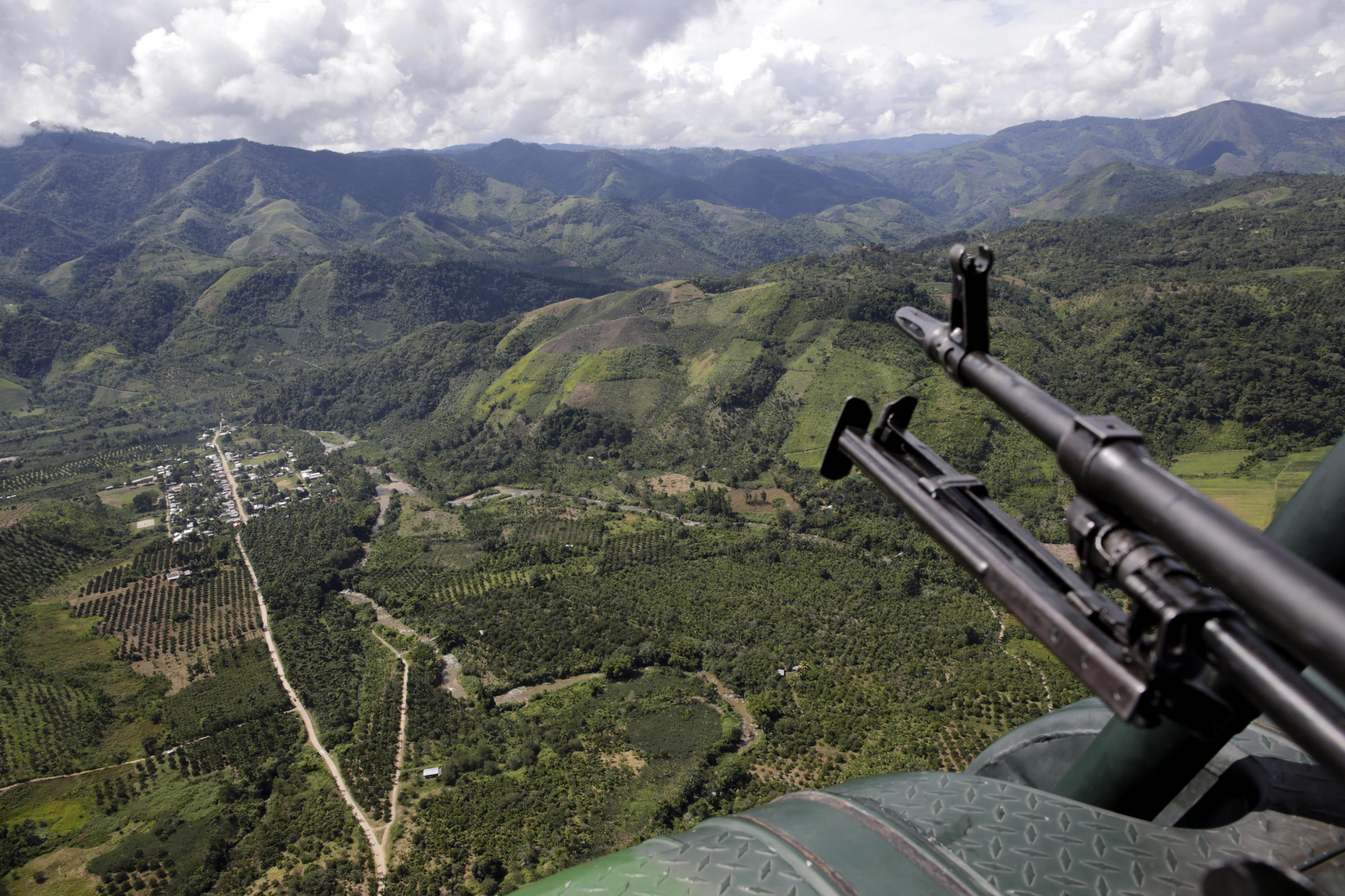 El ministro de Defensa, Pedro Cateriano Bellido, cumplió una visita de inspección a las bases contraterroristas ubicadas en el Valle de los Ríos Apurímac, Ene y Mantaro (VRAEM) donde comprobó las condiciones óptimas en que se desempeñan nuestros soldados. Acompañado del comandante general del Ejército, General Ronald Hurtado Jiménez, el titular del sector arribó a las bases de Mazamari, Pichari e Incahuasi, en las regiones Junín y Cusco. En Incahuasi, el ministro verificó las nuevas instalaciones y el correcto desempeño del personal asignado en esta base militar, desde donde se logrará control territorial en la zona. También se supervisaron las operaciones militares que se realizan en Mazángaro y Unión Mantaro, puntos claves en el VRAEM y rutas de tránsito del narcotráfico. El ministro Cateriano anunció que el gobierno reforzará la estrategia contraterrorista con importantes adquisiciones. “A fines de este año llegarán ocho nuevos helicópteros para servir en esta zona. Se trata de una geografía agreste donde el principal vehículo de transporte es el helicóptero, y las Fuerzas Armadas lo requieren”, mencionó. Finalmente, adelantó que el gobierno construirá cuatro nuevas bases contraterroristas y la Fuerza Aérea adquirirá seis radares, destinados a reforzar la lucha contra el terrorismo, narcotráfico y otras amenazas.